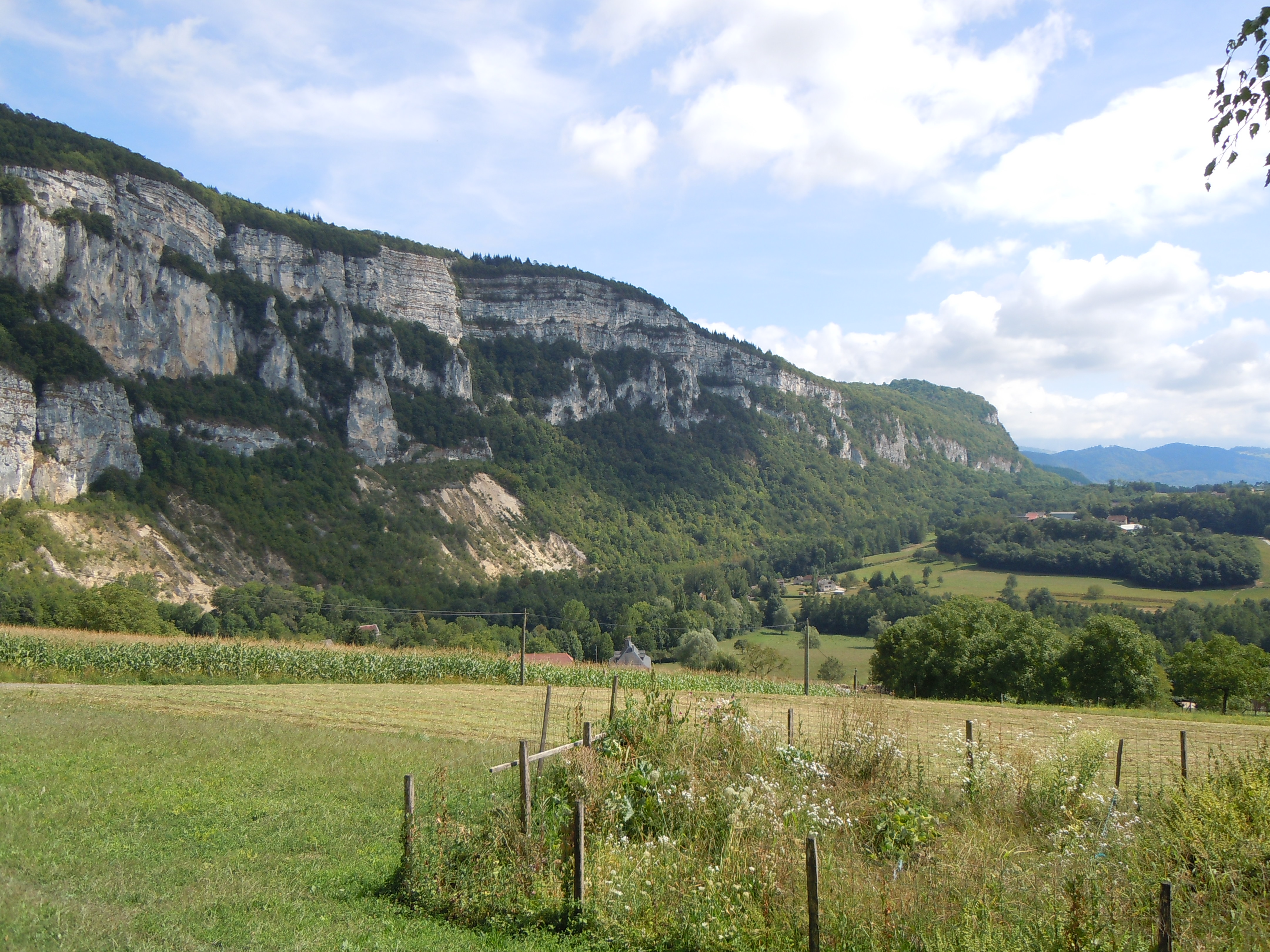 Falaises du Col de la Crusille et du Col du Banchet - depuis Rochefort (Savoie)